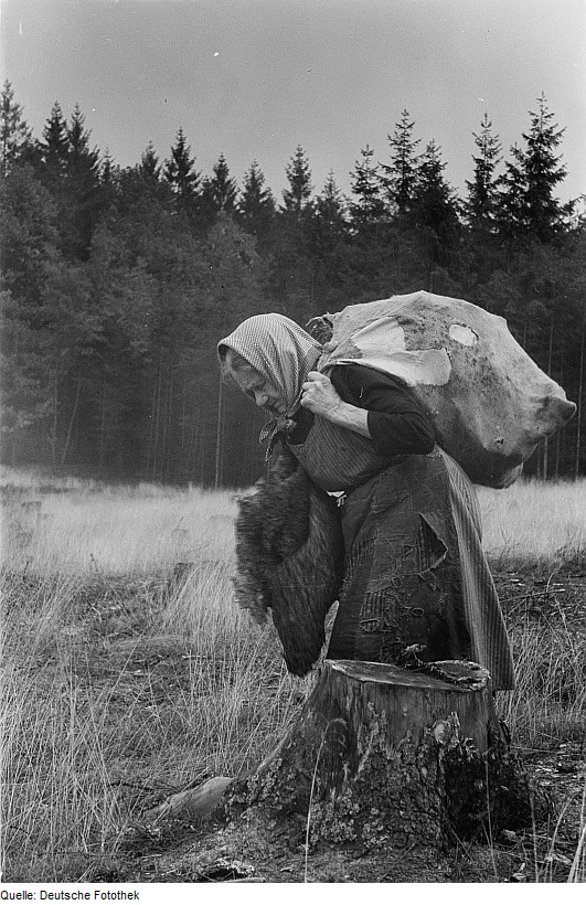 Original image description from the Deutsche Fotothek Alte Frau trägt gesammeltes Brennholz im Sack über eine Waldlichtung in der Umgebung Dresdens